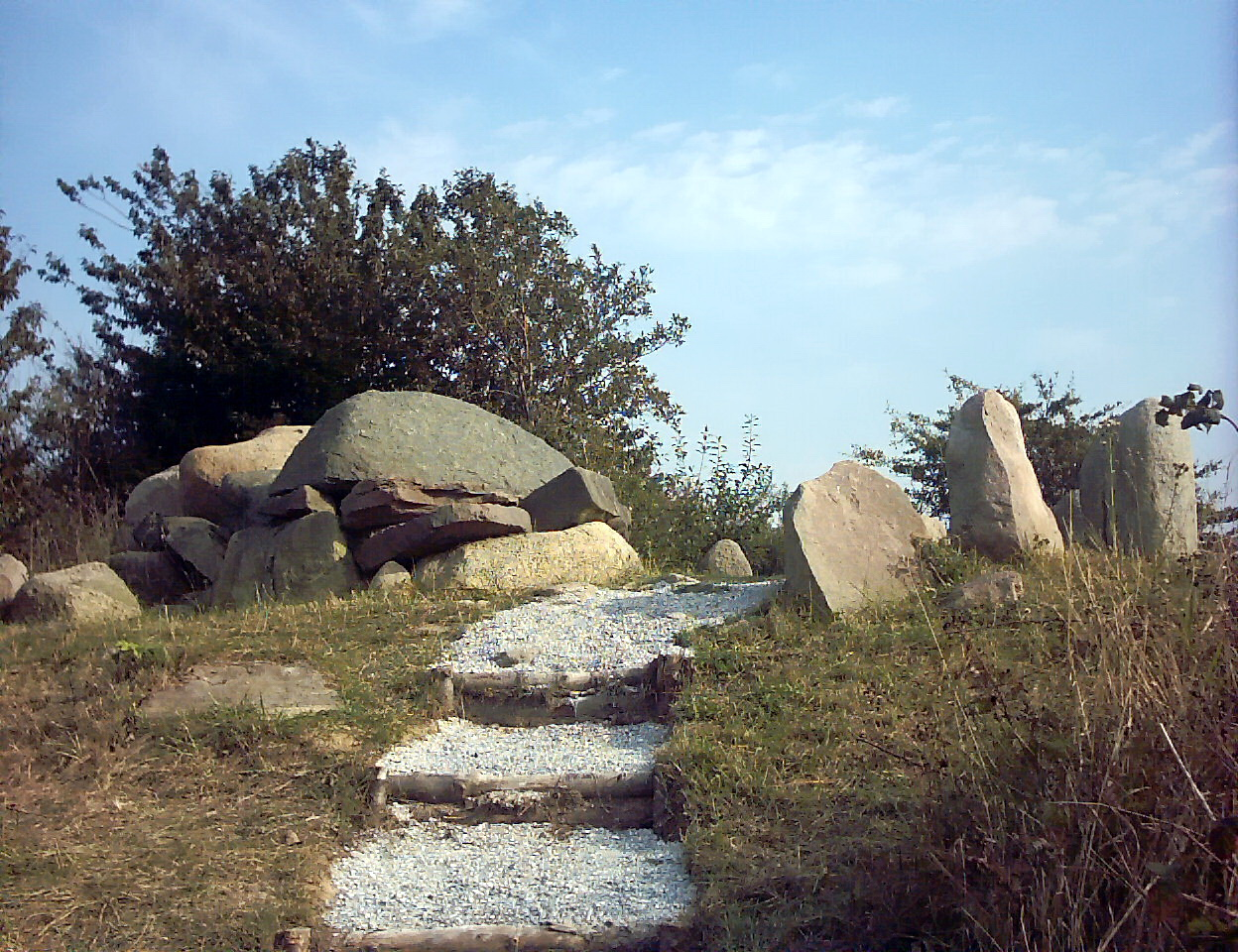 Das Bild stellt ein steinzeitliches Hügelgrab auf der Insel Rügen da. Das Bild wurde vom Wiki-User J C D erstellt und ist gemeinfrei. J C D 23:24, 11. Feb 2006 (CET)